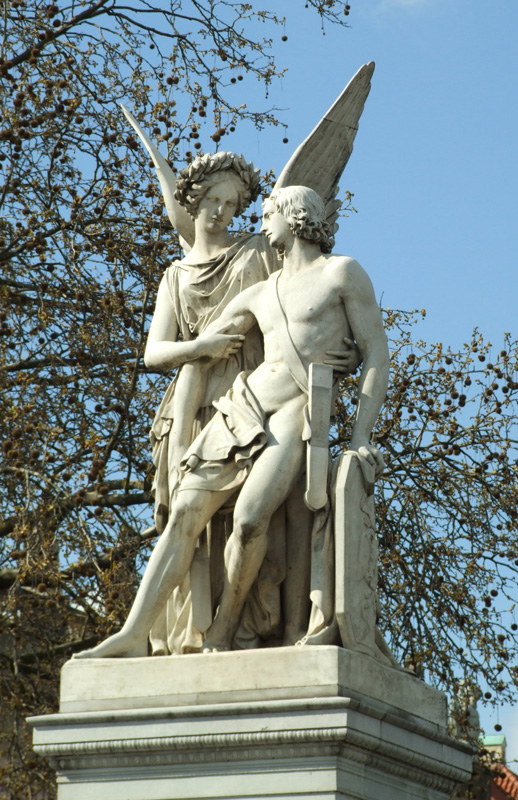 Skulptur auf der Berliner Schloßbrücke (nordwestliche Seite): Nike richtet den Verwundeten auf von Ludwig Wilhelm Wichmann von 1853